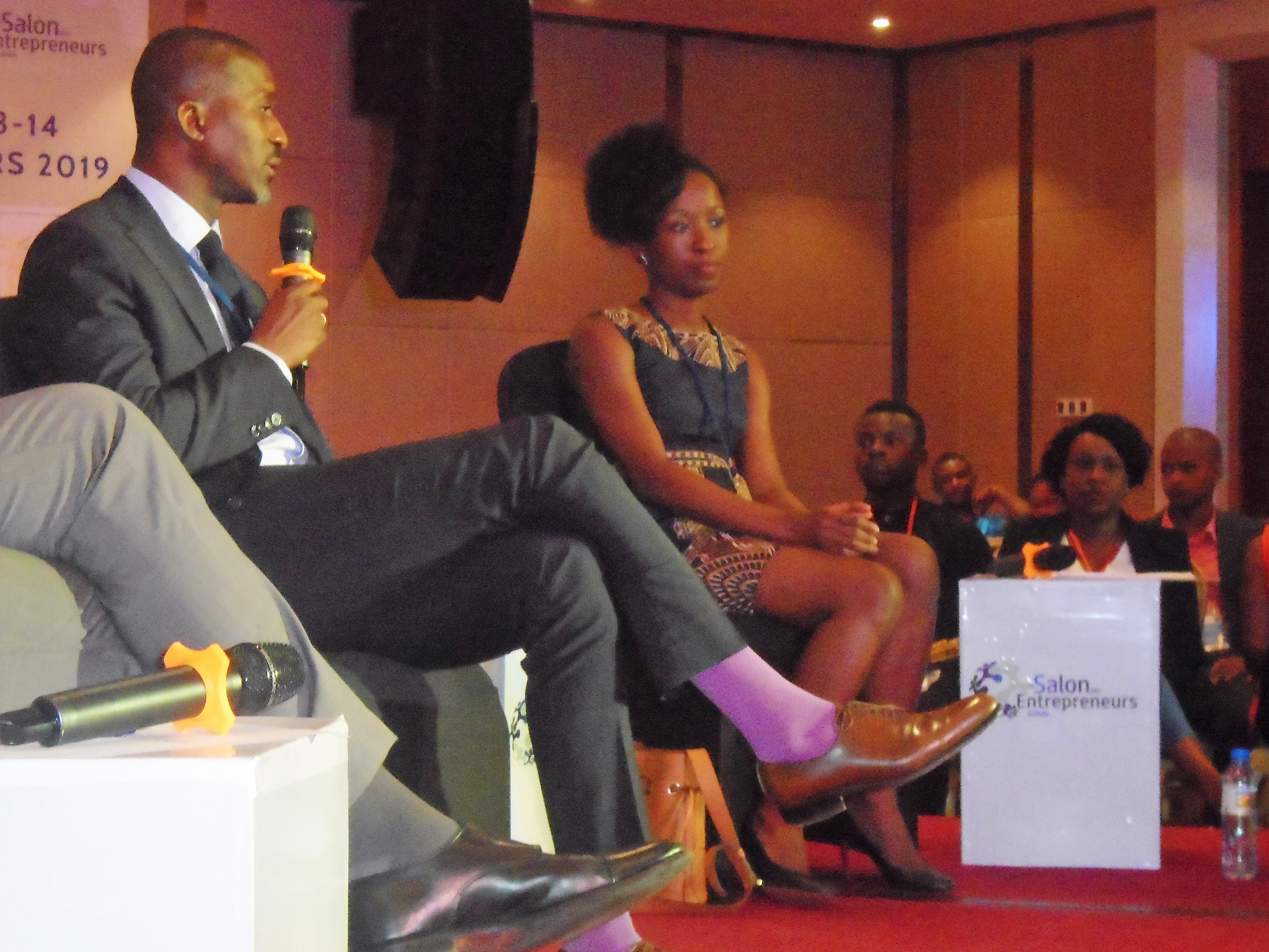 SADEN panel sur l'apport des diaspo a la Guinée